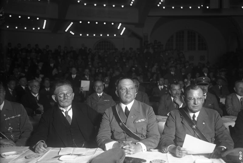 Die grosse Kundgebung für das Volksbegehren im Sportpalast in Berlin ! Das Präsidium des Reichs-Ausschusses für das Volksbegehren von links nach rechts: Geheimrat Hugenberg, der bekannte Herausgeber der Hugenberg-Presse und Führer der Deutschnationalen Volkspartei, Major von Stephani, Führer der Stahlhelmgruppe Berlin, Seldte, der Führer der Gründer des Stahlhelms während der Kundgebung für das Volksbegehren im Sportpalast in Berlin. [Text Bild 102-08444]